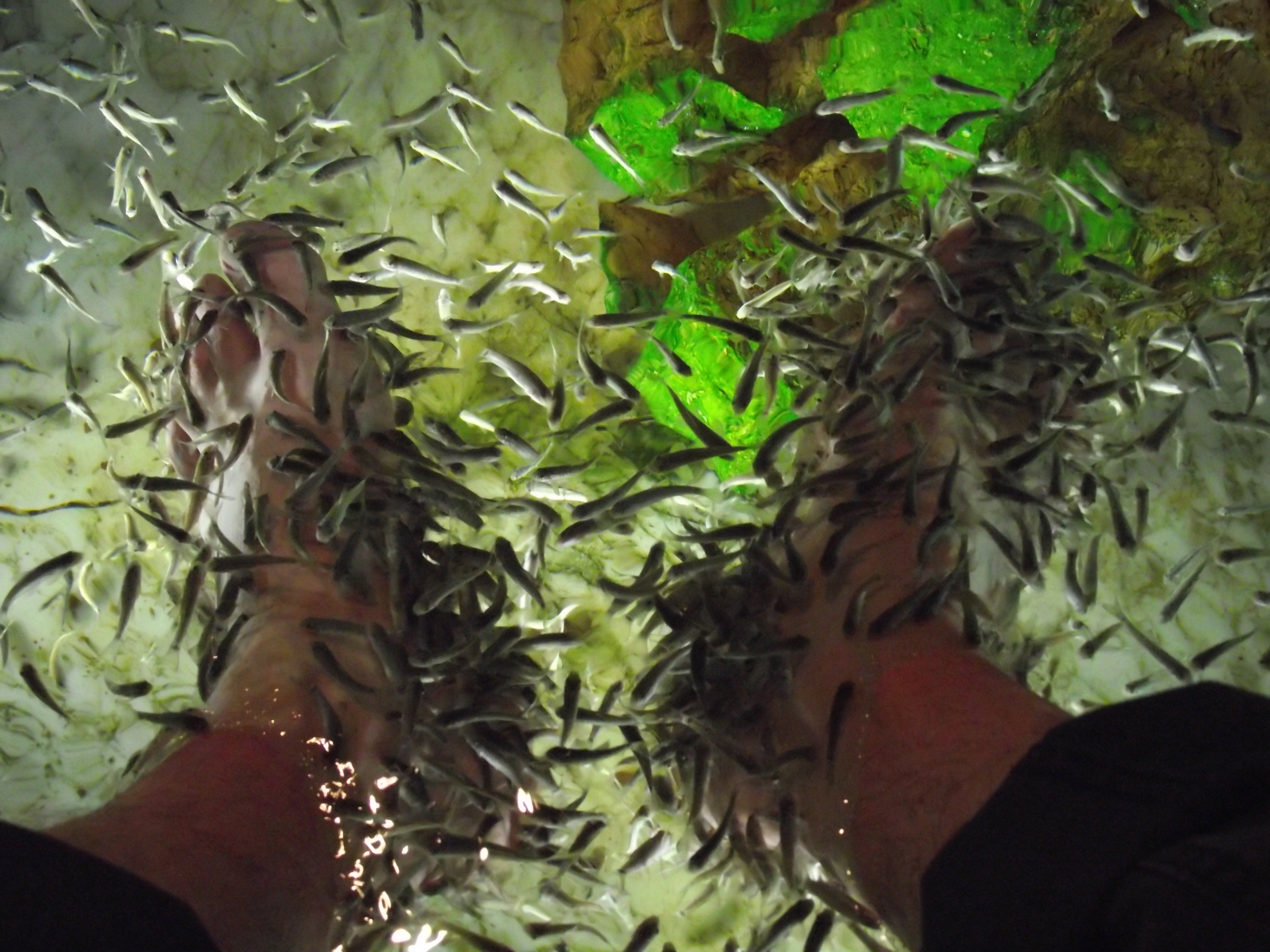 Garra rufa, poissons pédicure du Cabinet du Docteur Yu à Pairi Daiza